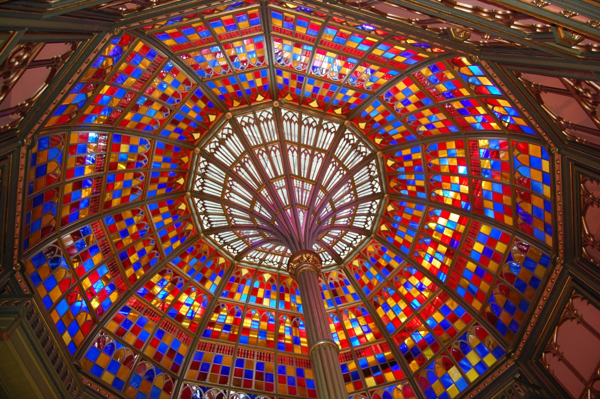 Old Louisiana State Capitol dome (interior)